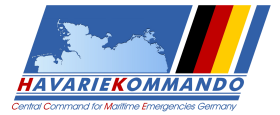 Havariekommando (Emblem)